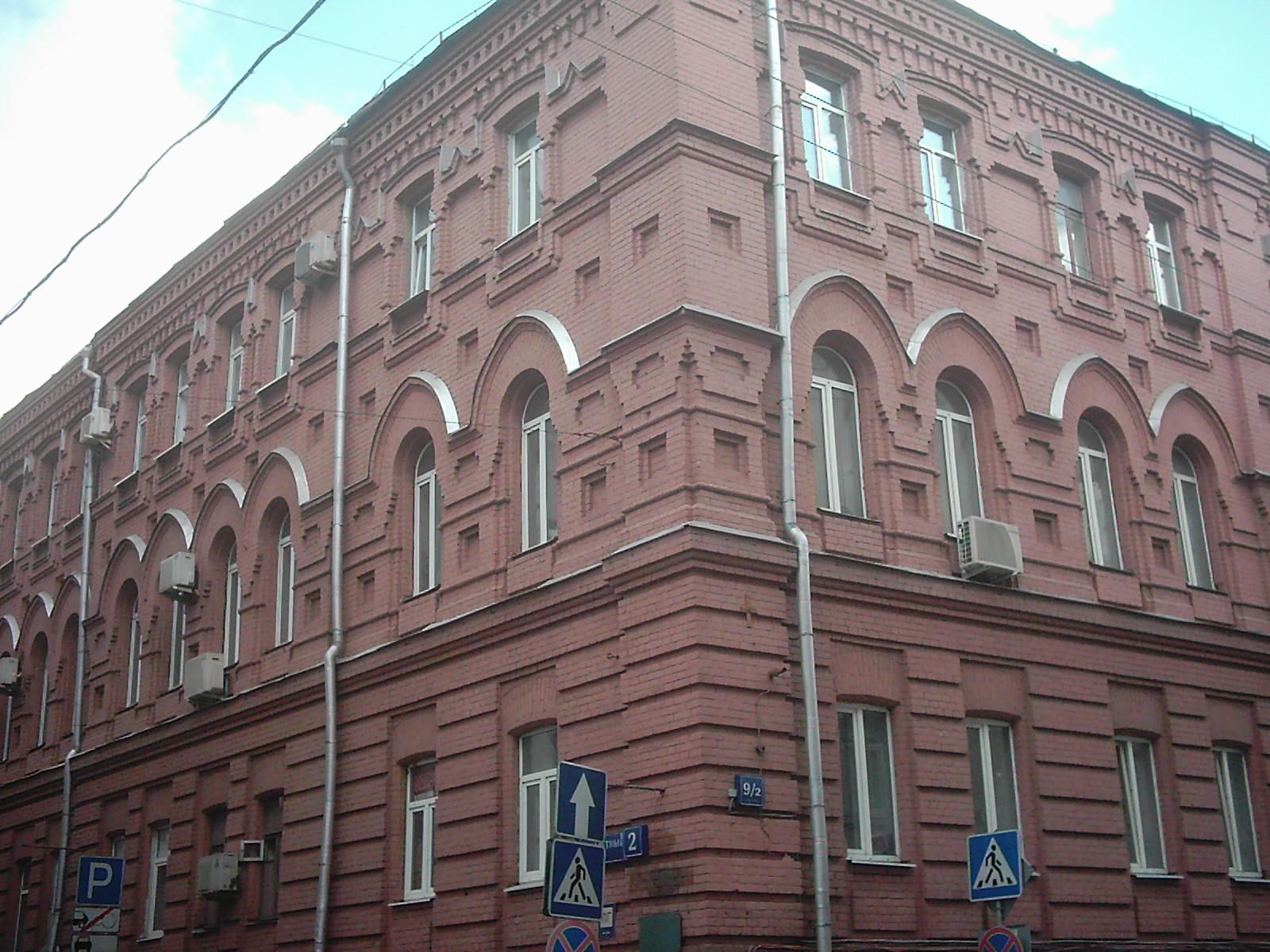 Большой Каретный переулок, дом 2.